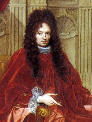 Ritratto del doge Giovanni Battista Cattaneo Della Volta